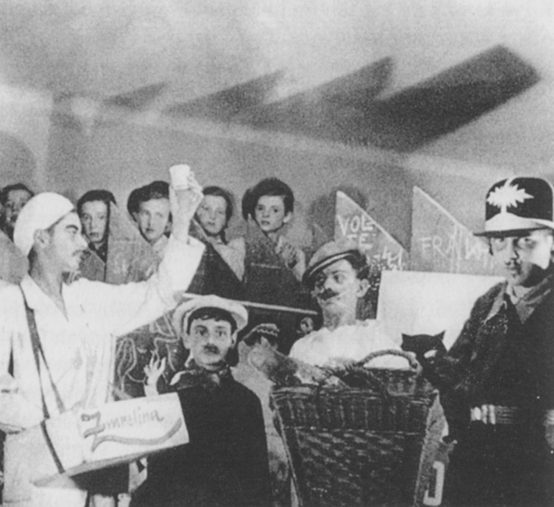 Fotografie z premiéry dětské opery Brundibár, Praha, Belgická 25, přelom 1942/1943